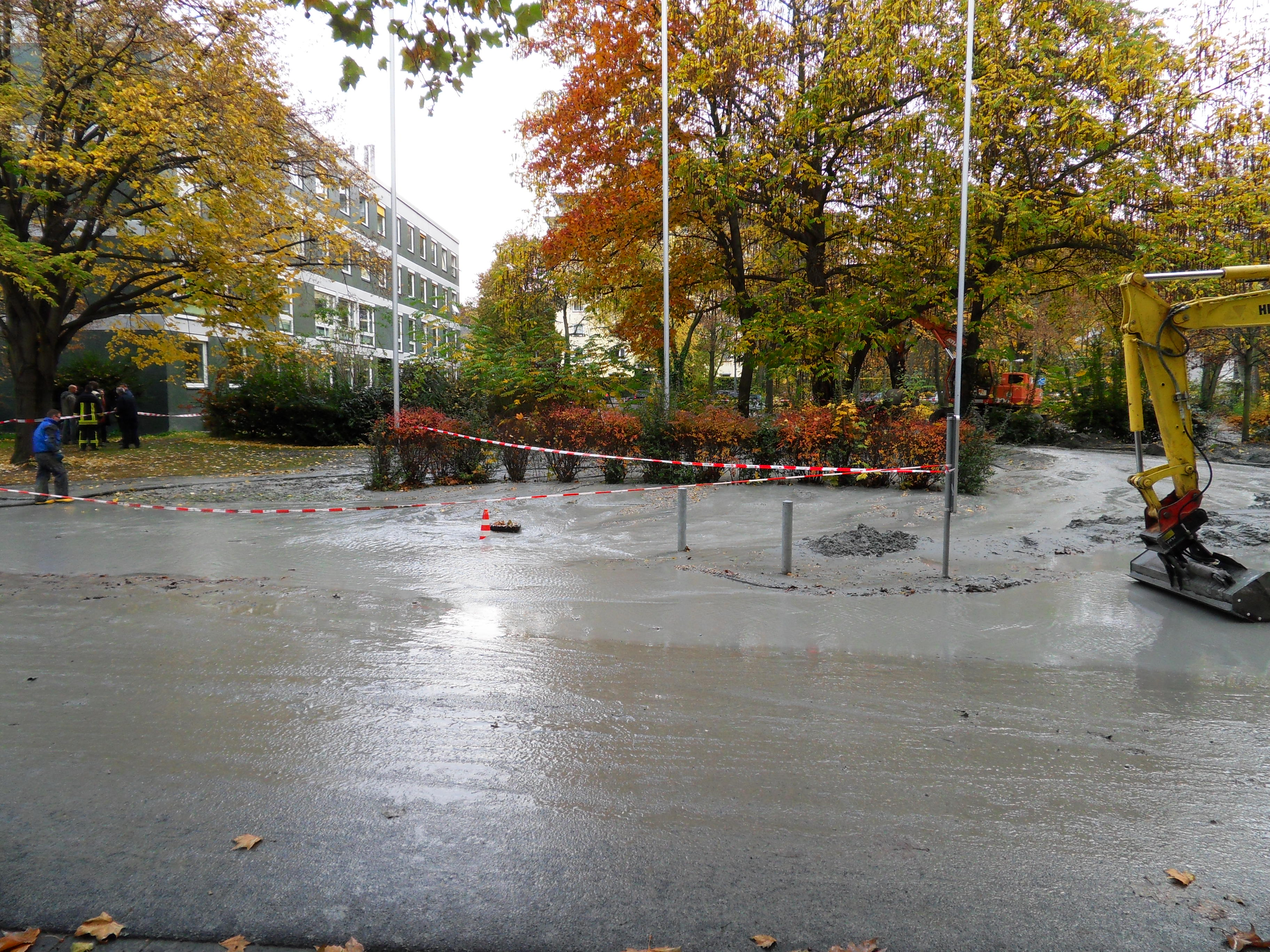 Wasseraustritt nach einer Geothermie-Probebohrung in Wiesbaden auf dem Parkplatz des Hessischen Ministeriums der Finanzen (links im Bild) in der Friedrich-Ebert-Allee. Das Wasser sprudelt zwischen den Bäumen in der Bildmitte zu Tage und verschwindet wirbelnd in einem Straßenablauf, dessen Abdeckung abgenommen und mit einem Warnkegel markiert wurde. Das Wasser ist grau gefärbt von dem fehlgeschlagenen Versuch, das unter hohem Wasserdruck stehende Bohrloch mit Beton zu verschließen. Der Wasseraustritt begann am Vorabend mit 6.000 bis 8.000 Liter Wasser pro Minute.